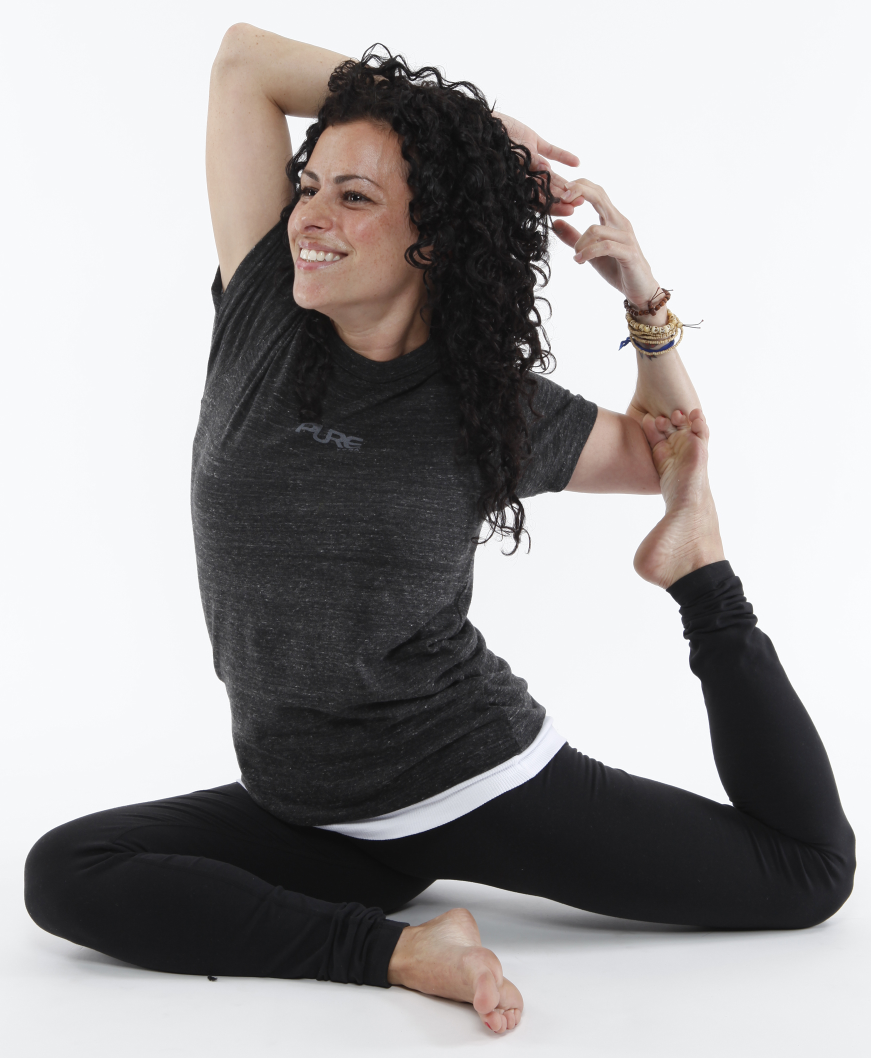 Eka Pada Rajakapotasana - One Legged Royal Pigeon Pose. Sometimes called mermaid pose